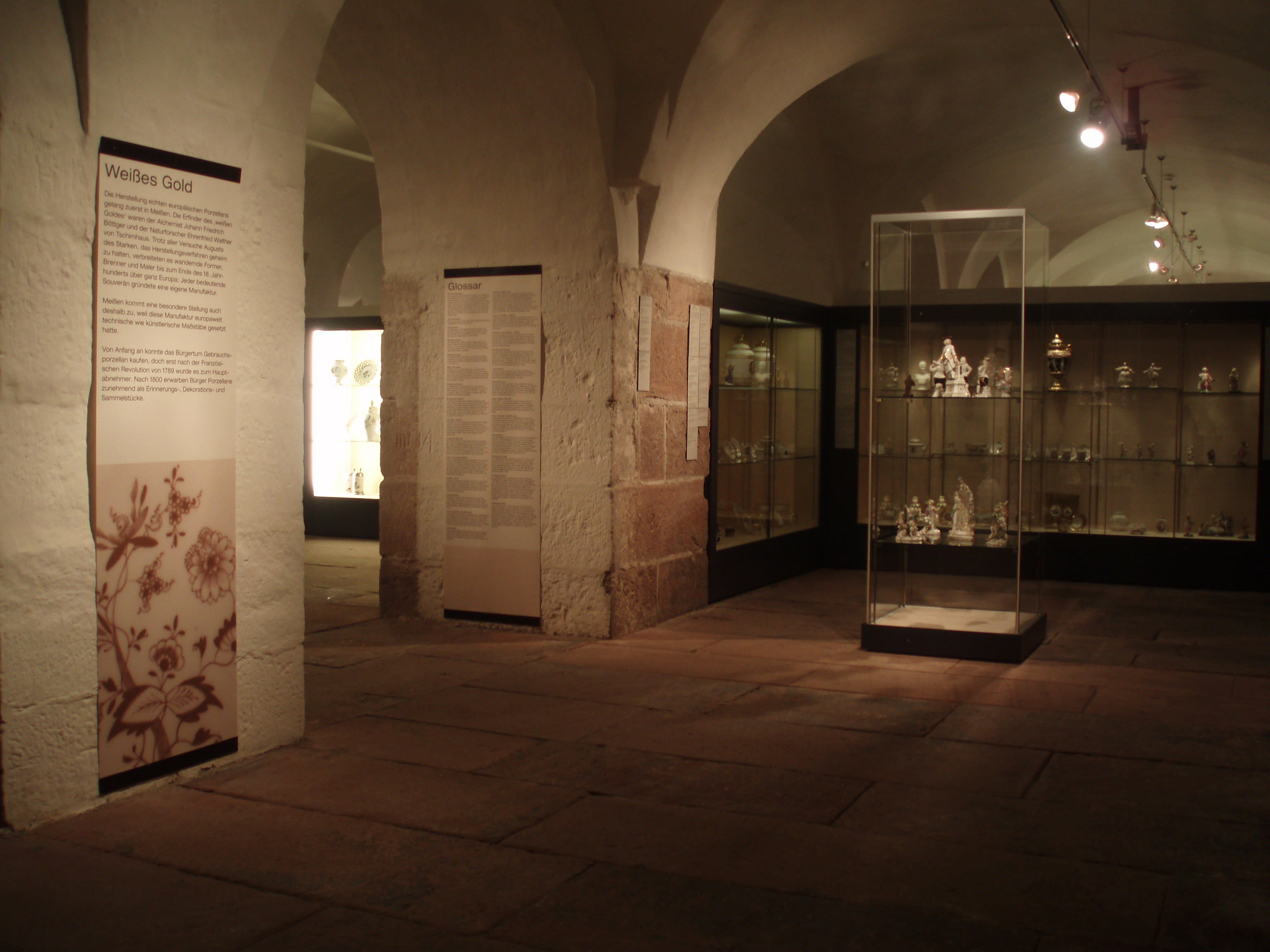 Reiss-Engelhorn-Museen Mannheim: Museum Zeughaus, Untergeschoss, Porzellankabinett